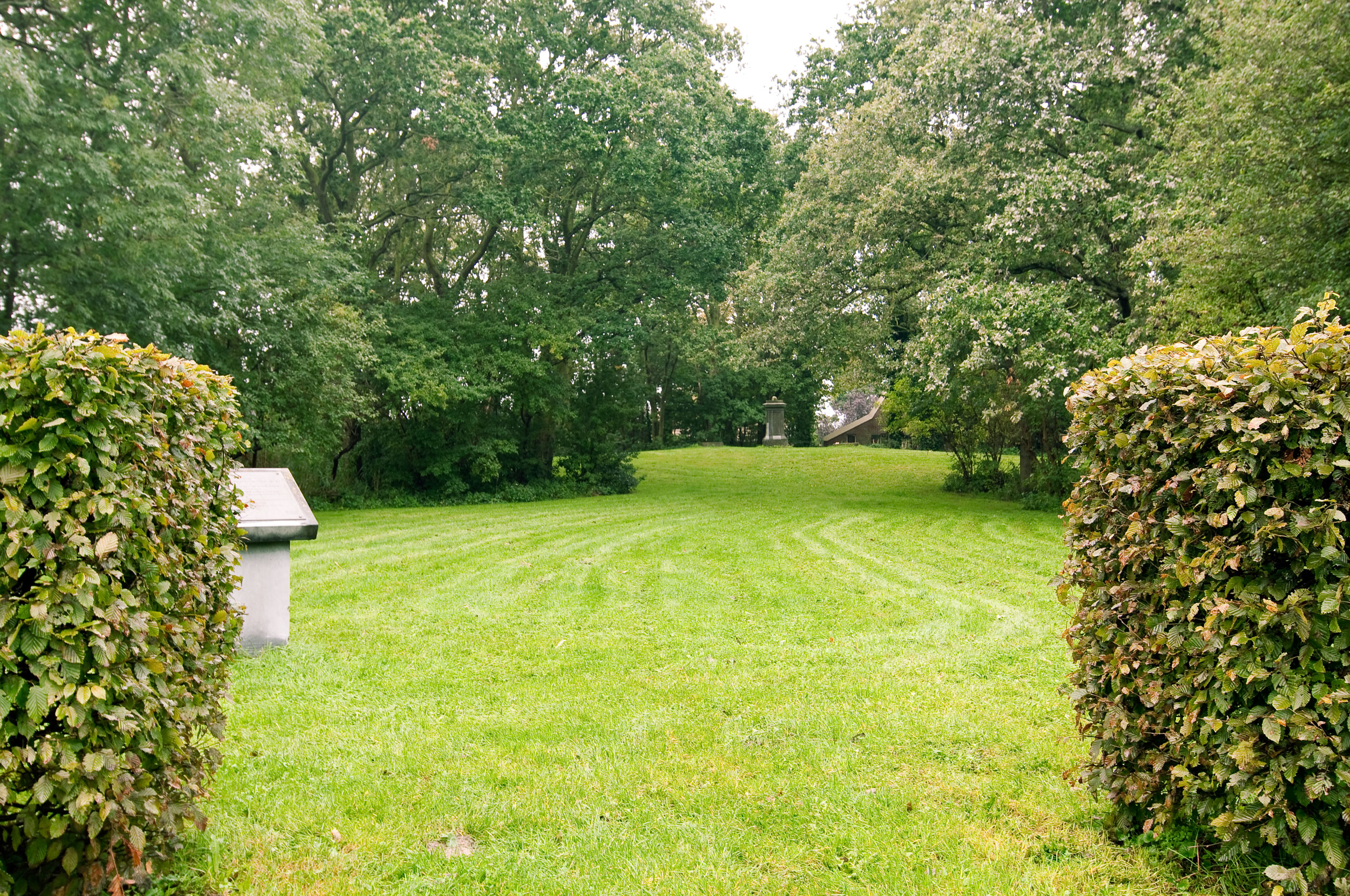 Huldtoneel gezien vanaf de Rijksstraatweg